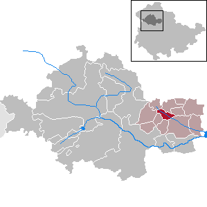 Bruchstedt in Thuringia - Unstrut-Hainich-Kreis